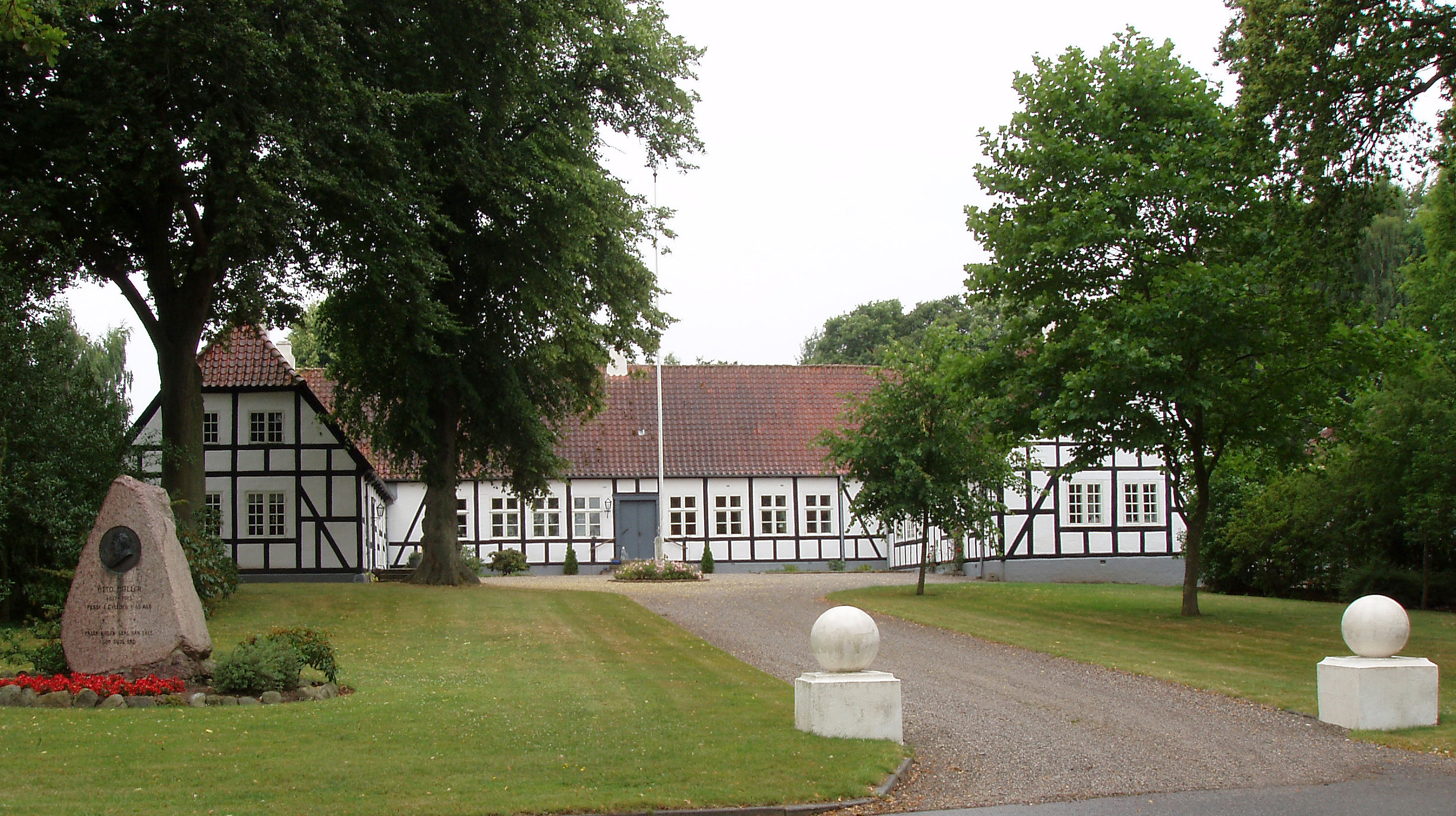 Gylling Præstegaard Gylling, Jutland, Denmark